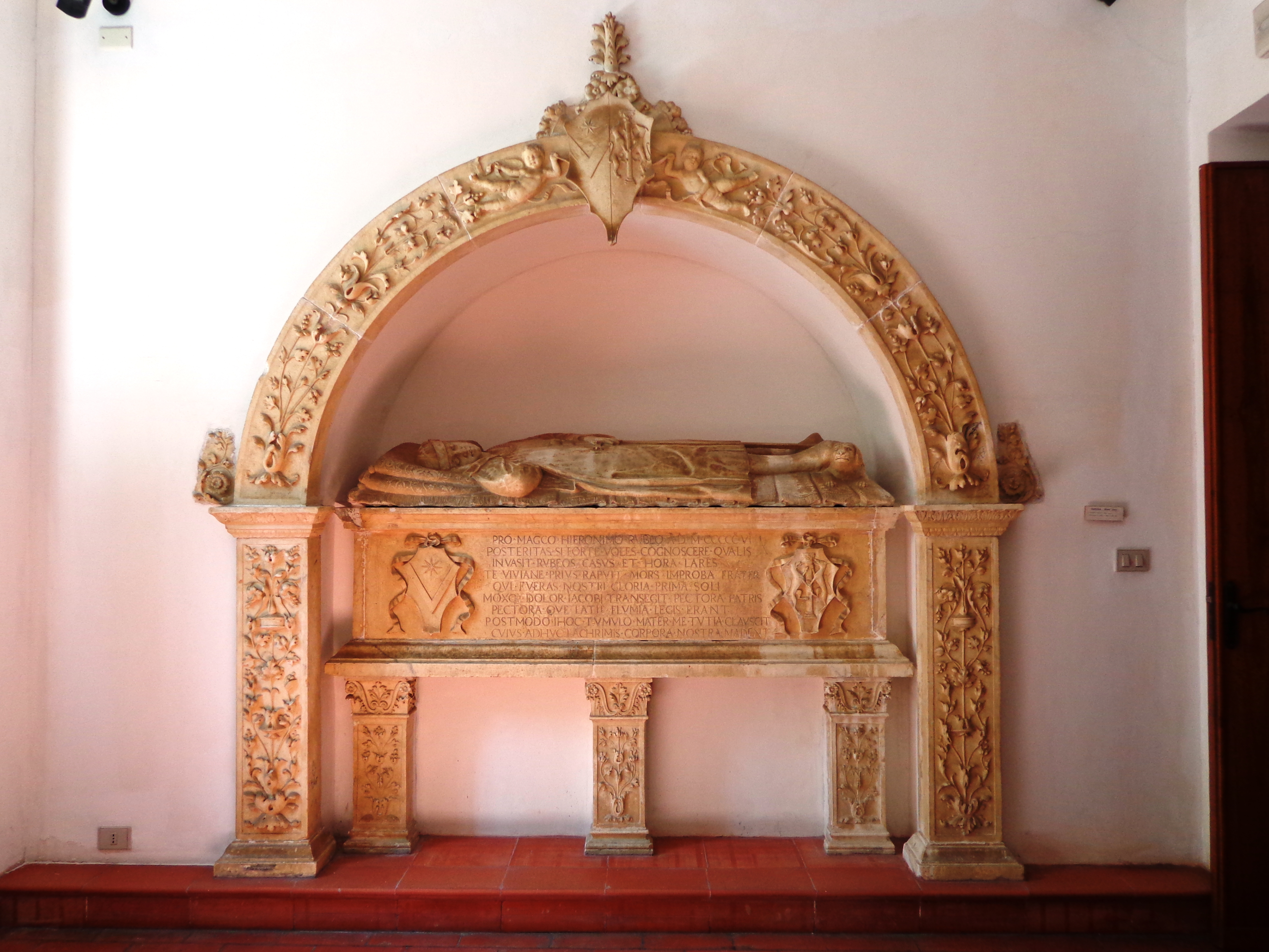 Castroreale_04_2014_02